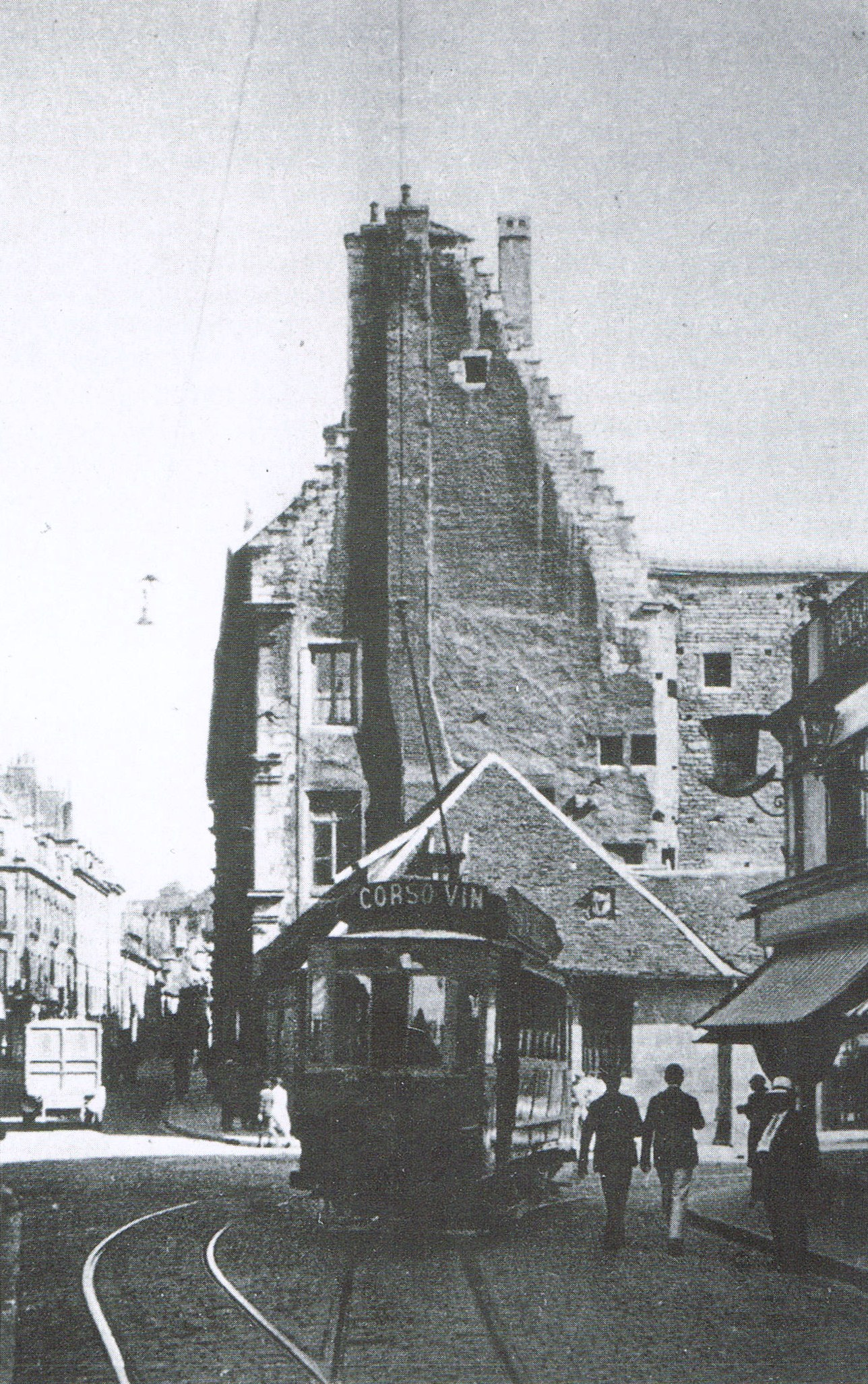 Le mur pigeon du Palais Granvelle et le tramway de Besançon, à l'angle de la Grande-Rue et de la rue de la Préfecture à Besançon (Doubs, France).